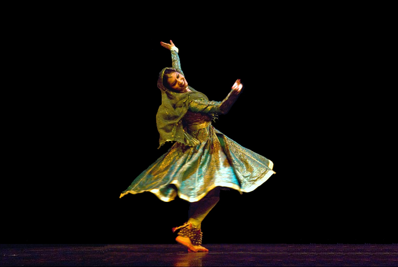 Kathak